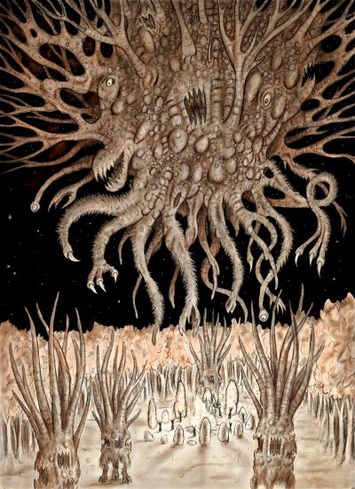 Vision d'artiste de Shub-Niggurath.